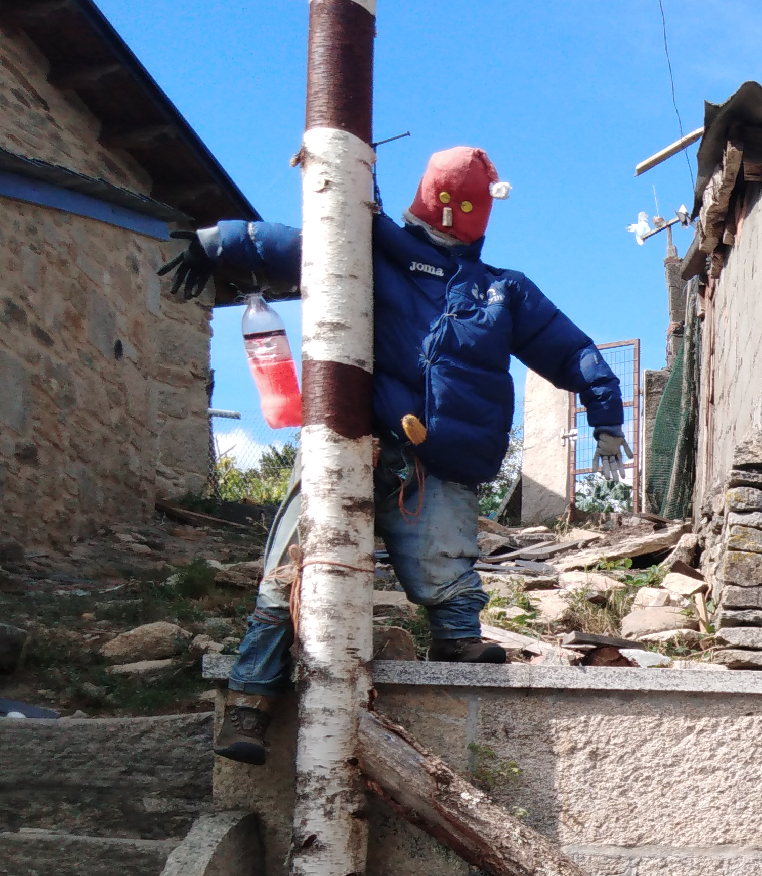 Fonte e lardeiro no Tameirón (A Gudiña)